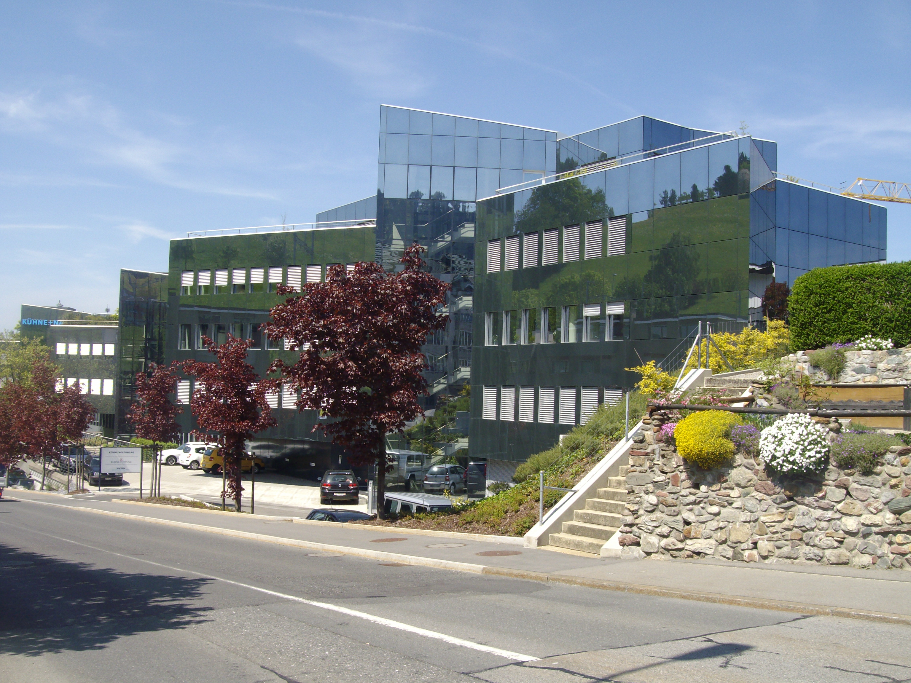 Kühne + Nagel, Hauptgebäude in Schindellegi